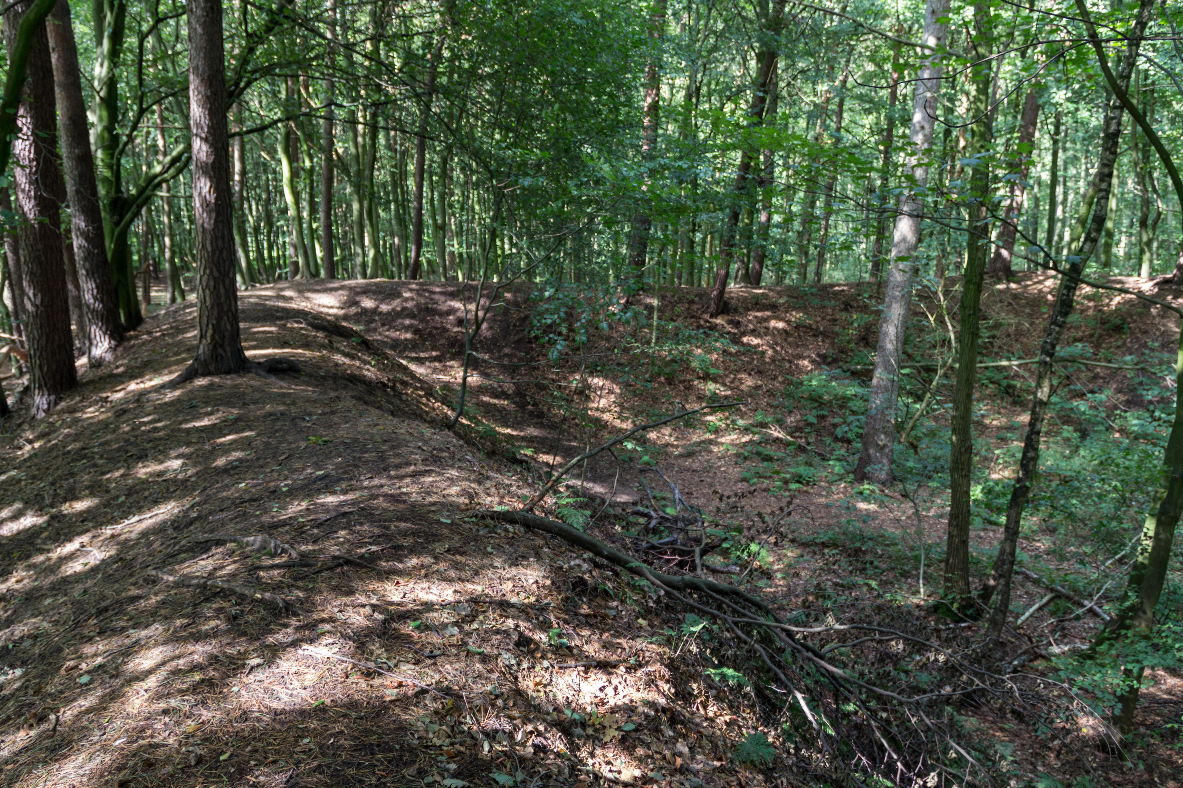 Visbeck, Überreste des ehemaligen Krupp'schen Schieß- und Versuchsplatz (Teil der Umwallung des Laboratoriums), Dülmen, Nordrhein-Westfalen, Deutschland This is a photograph of an archaeological site.It is on the list of cultural monuments of Dülmen